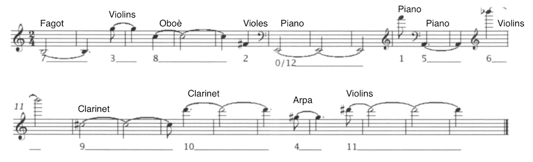 Aqui podem veure les notes de la serie dodecafònica que Gerhard introdueix al principi de la simfonia, amb els instruments que intervenen i la duraciö (en corxeres) de cada nota dins la serie.